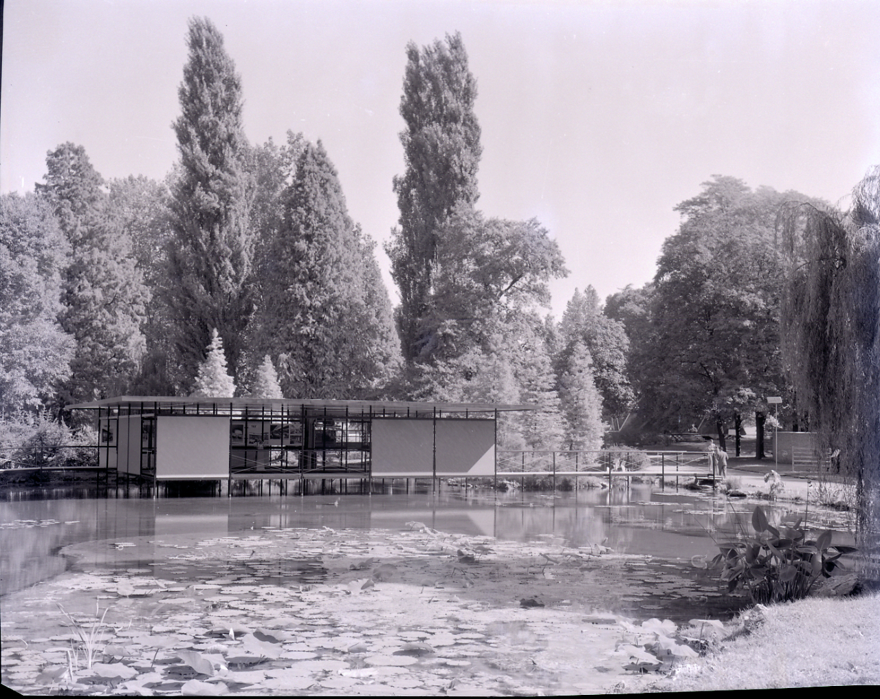 Servizio fotografico : Milano, 1954 / Paolo Monti. - Buste: 2, Fototipi: 2 : Negativo b/n, gelatina bromuro d'argento/ pellicola ; 10x12. - ((Serie costituita da 2 negativi identificati con i nn.: 20871-20872. La suddetta serie è contenuta nella scatola identificata con la numerazione 20828/20878. Sulla scatola manoscritto con pennarello nero: "X dal 1201 al 1260". La scatola è a sua volta contenuta in una scatola grande col coperchio giallo. - Occasione: Documentazione della X Triennale del 1954, intitolata "Prefabbricazione - Industrial Design: Esposizione Internazionale delle Arti Decorative e Industriali Moderne e dell'Architettura Moderna". L'esposizione si tenne presso il Palazzo dell'Arte